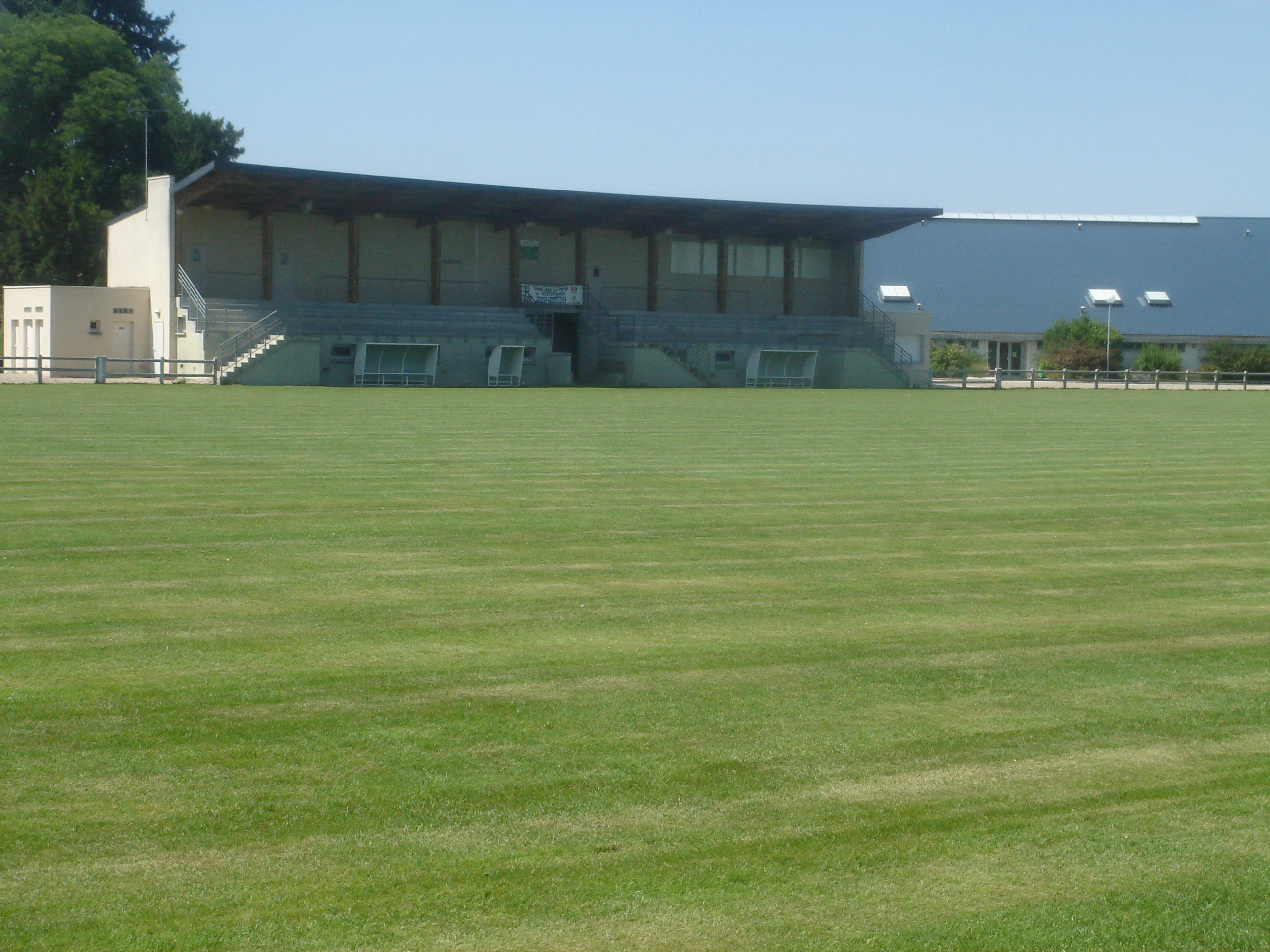 Terrain d'honneur de football, stade de la Cherelle, Jargeau, Loiret, France